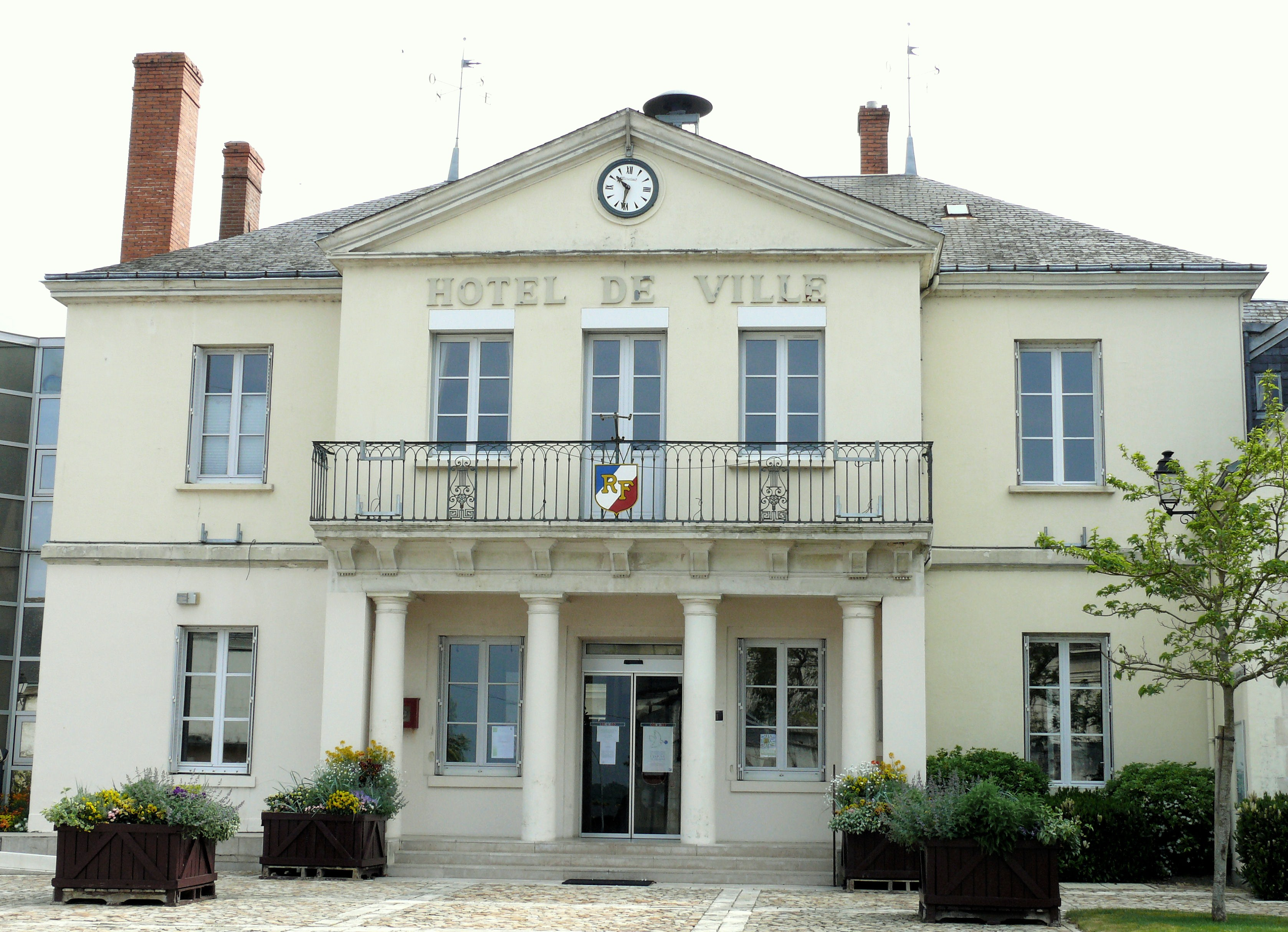 Châtillon-sur-Indre - Mairie